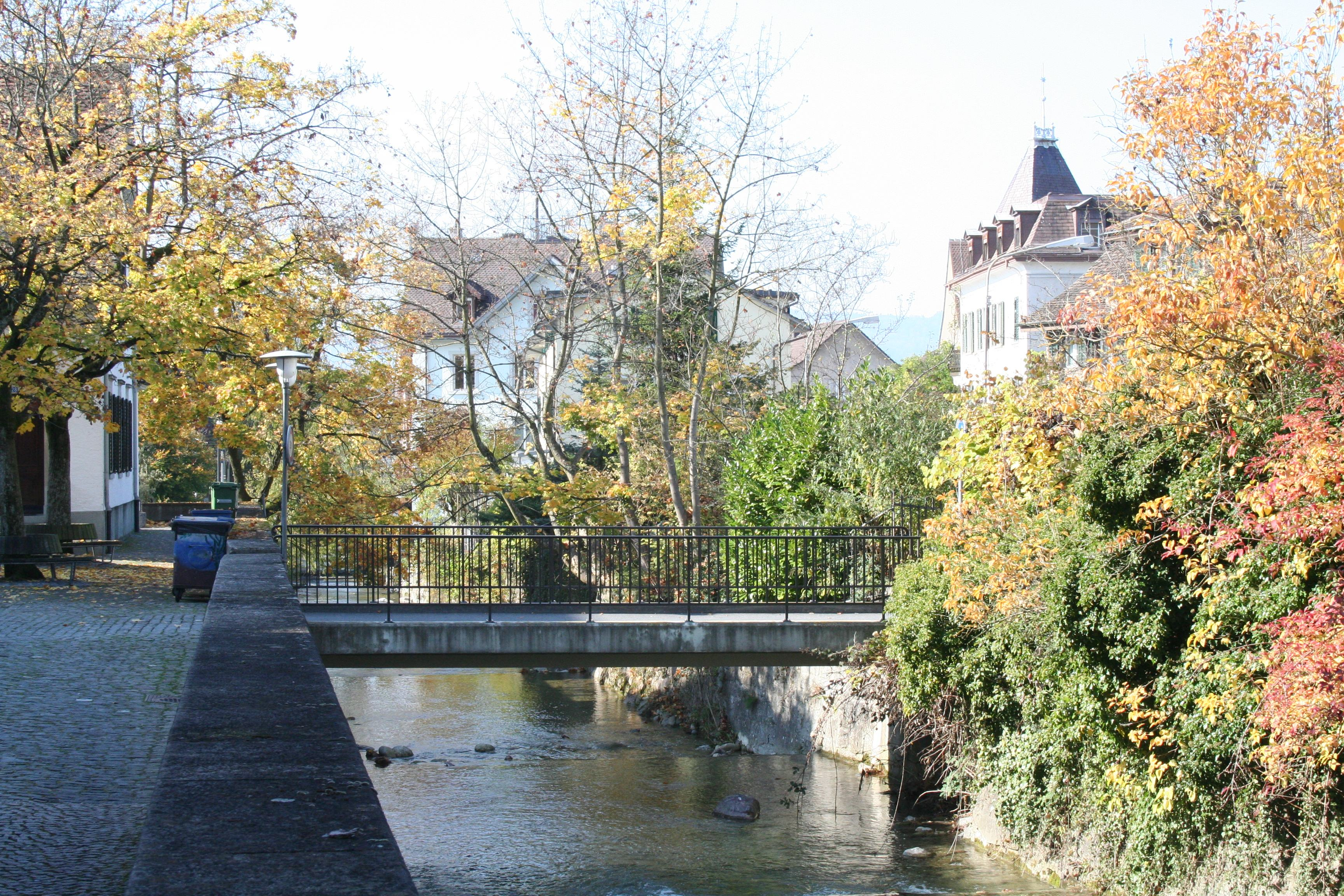 Kantonsschule Küsnacht, Brücke zum Areal